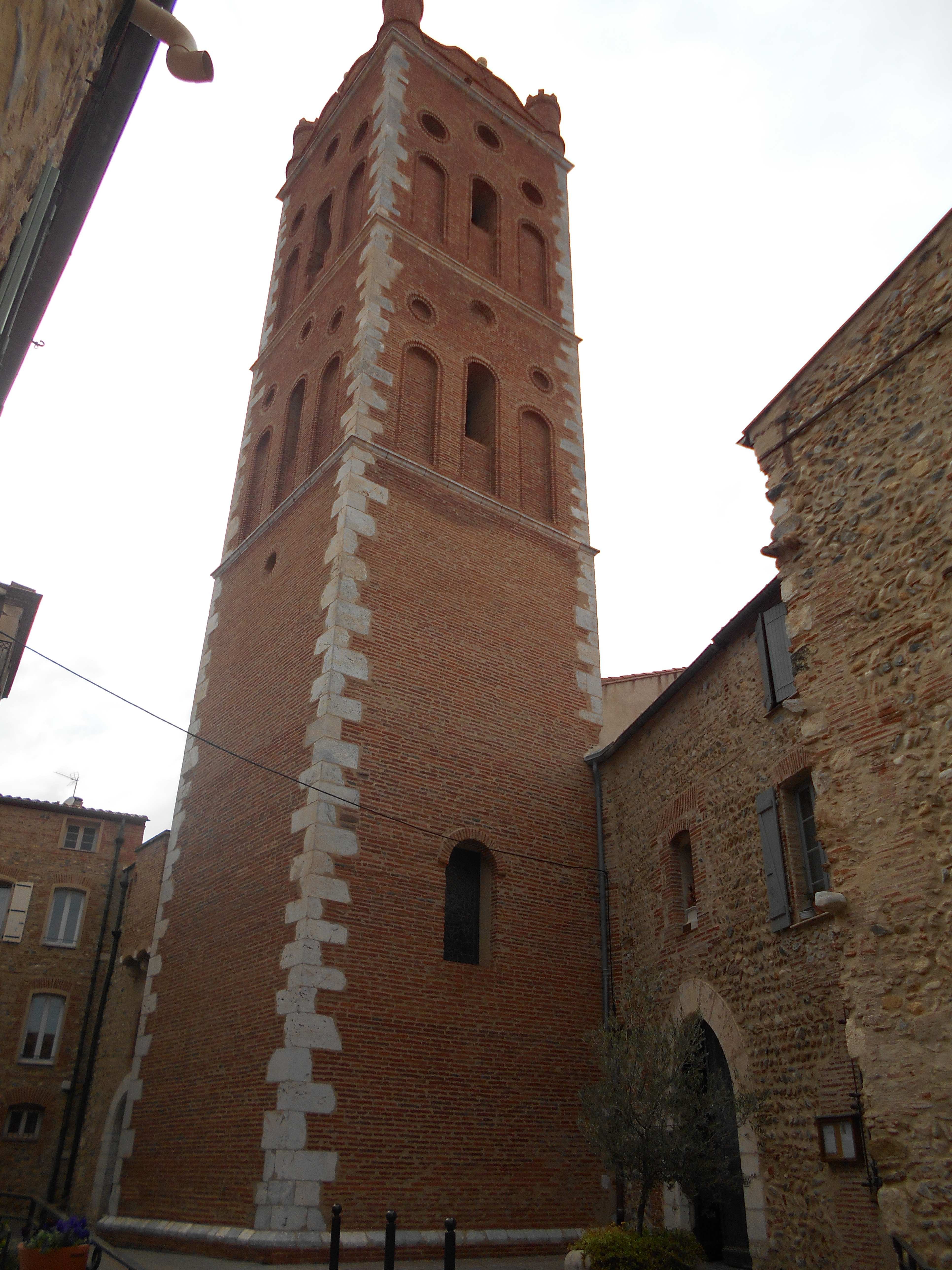 Sant Andreu de Ribesaltes, campanar